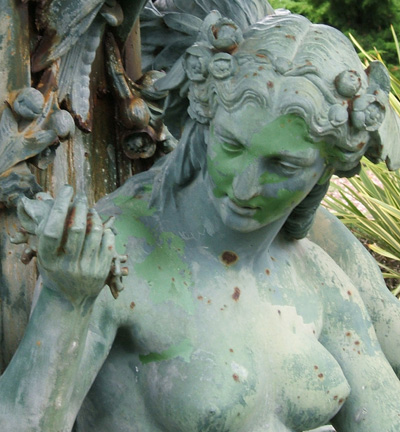 Fontaine de Tourny à Soulac-sur-Mer, Gironde, France